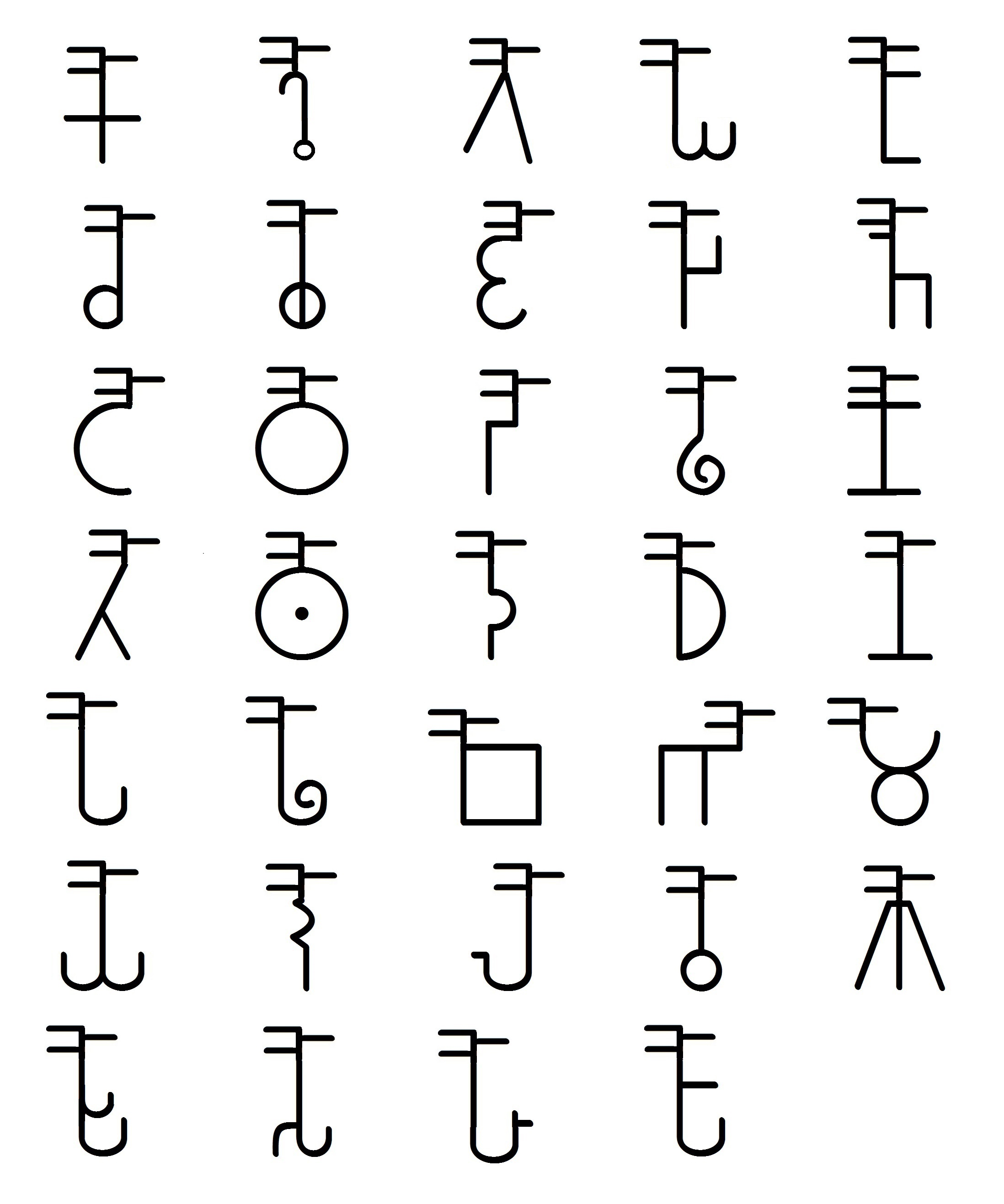 ब्राम्हि व्यंजनांचे औ-कार